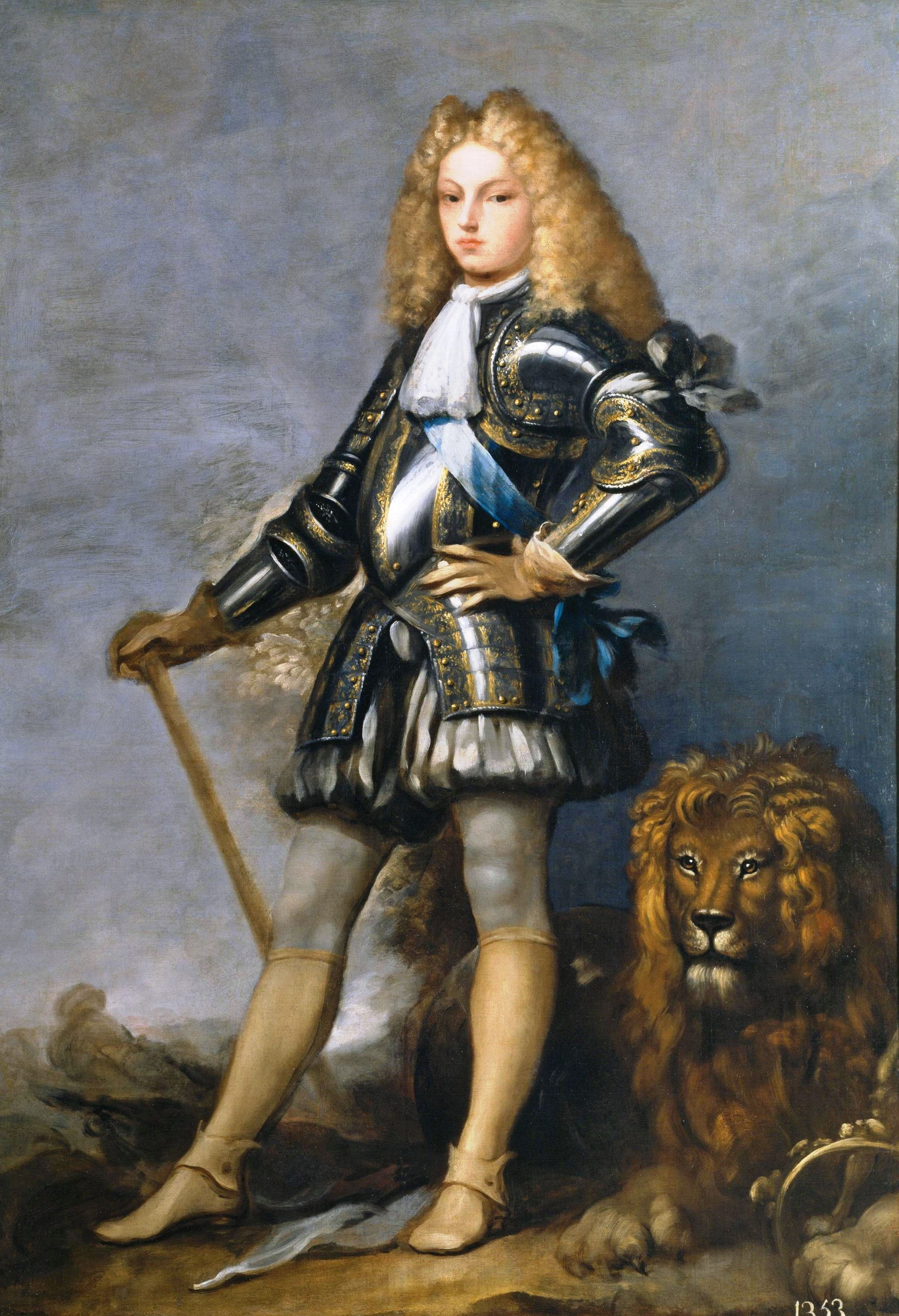 Retrato del rey Felipe V de España (1683-1746), que fue nieto del rey Luis XIV de Francia y el primer monarca de la Casa de Borbón en España.